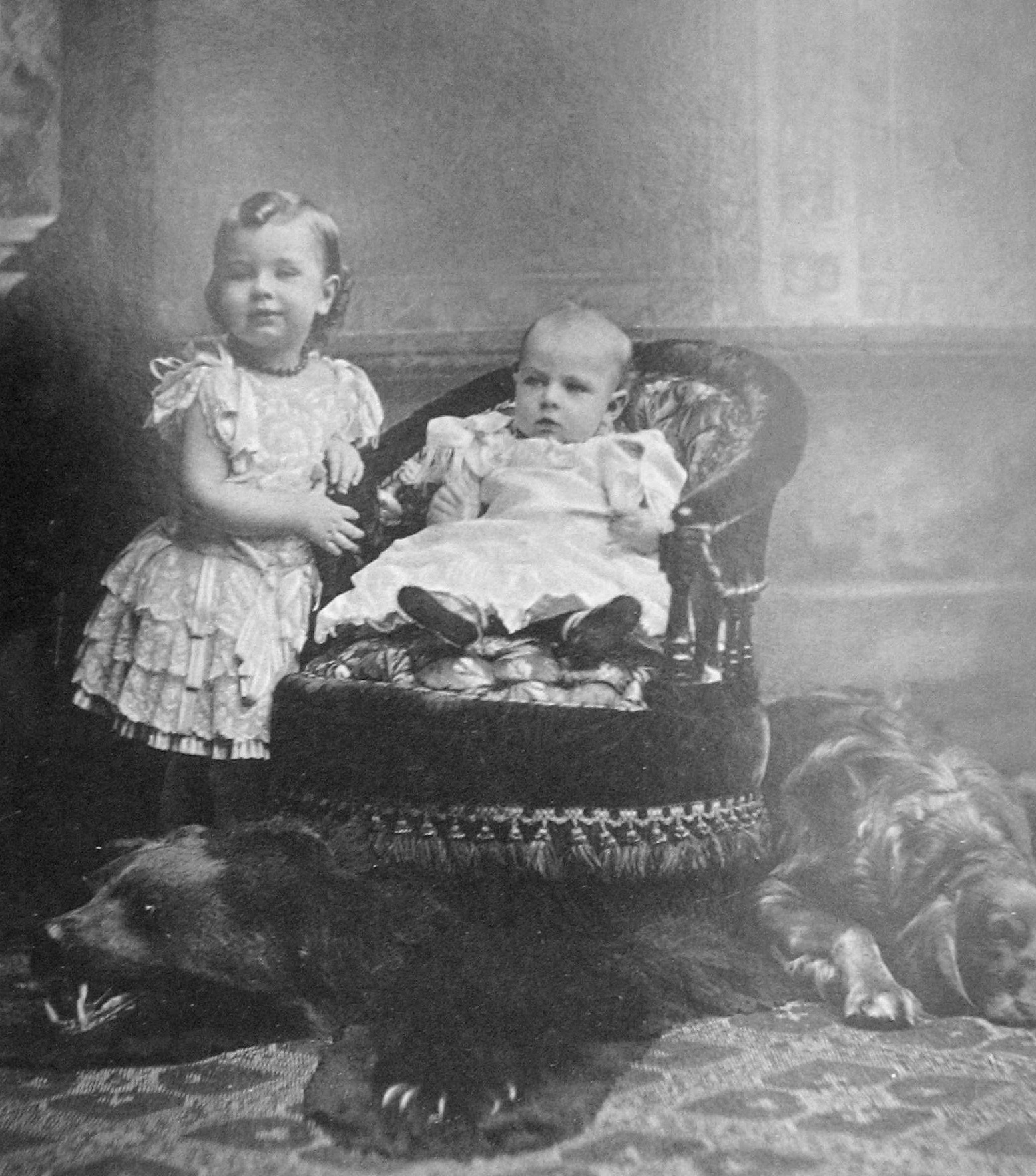 kronprins Gustav Adolf och prins Carl, 1885